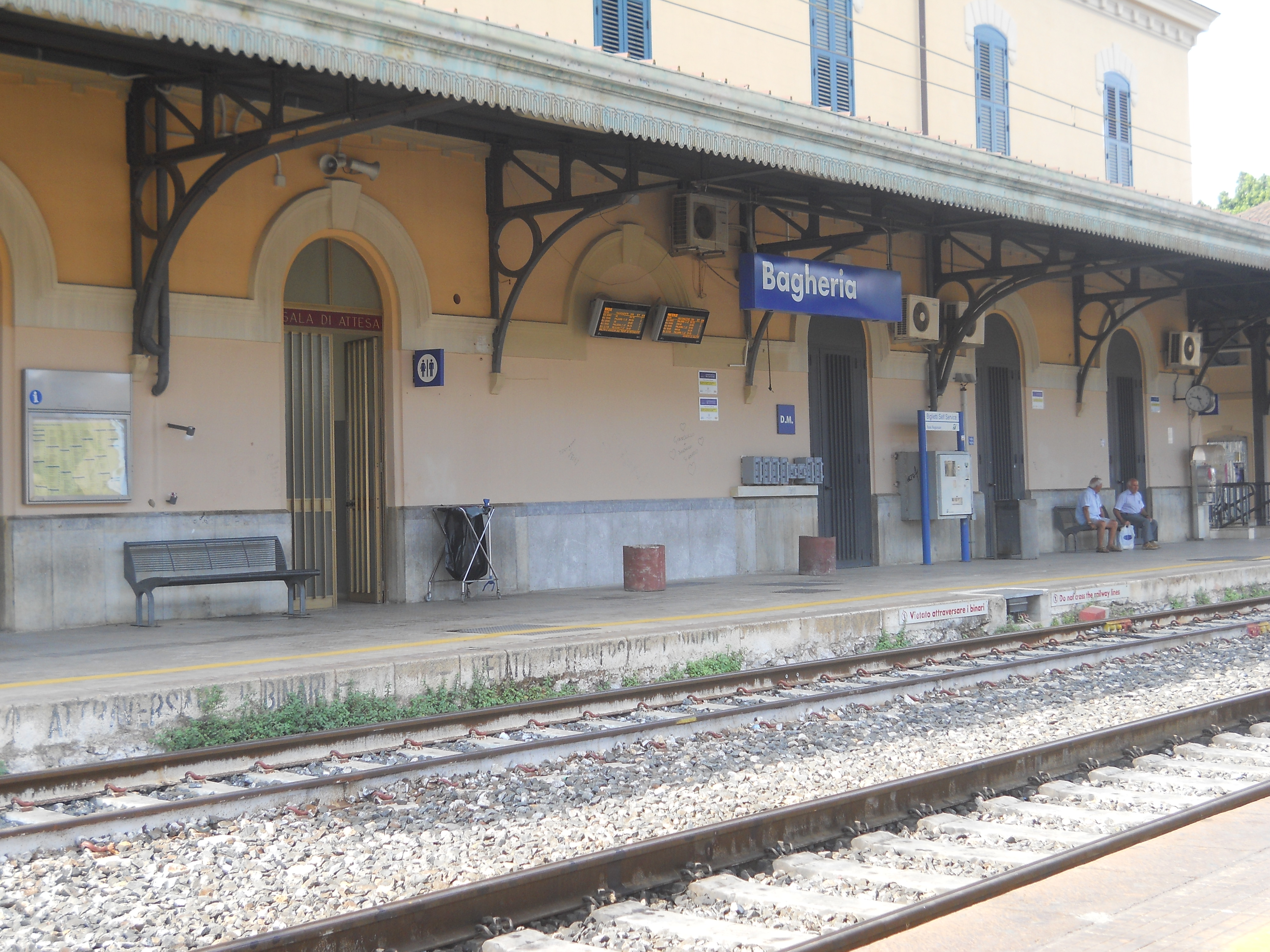 Stazione di Bagheria, grande centro in provincia di Palermo. (Tratta a doppio binario)